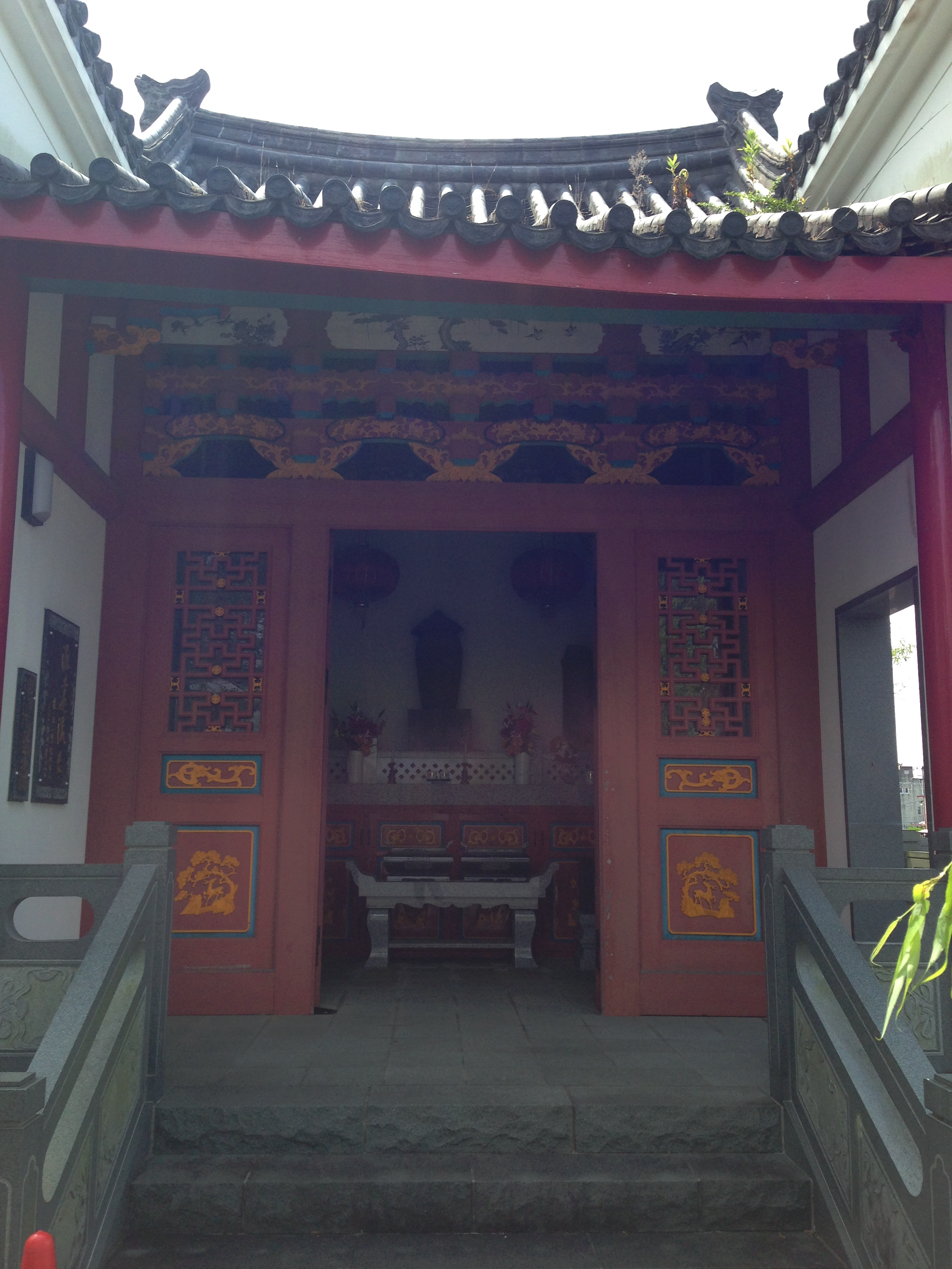 五島市江川町、明人堂（正面、一部屋根破損状態）